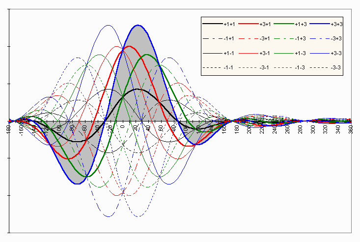 Die 16 Symbole von CAP16